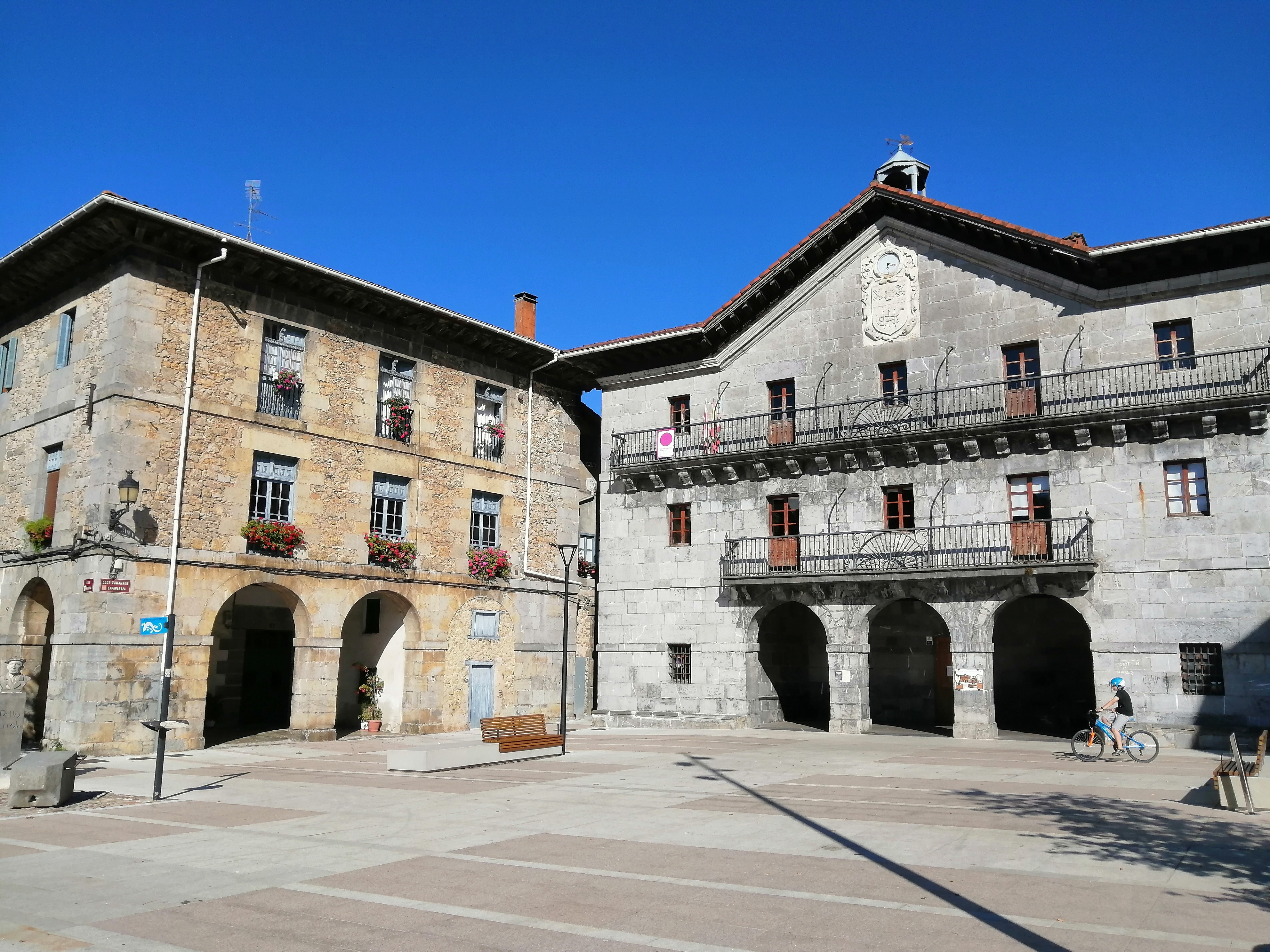 Asteasuko udaletxea